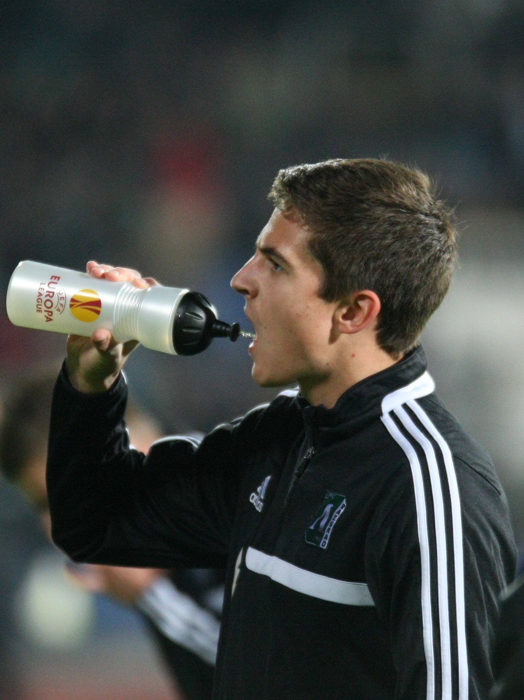 Теро Мантуля - финландски футболист, състезател на Лудогорец Разград